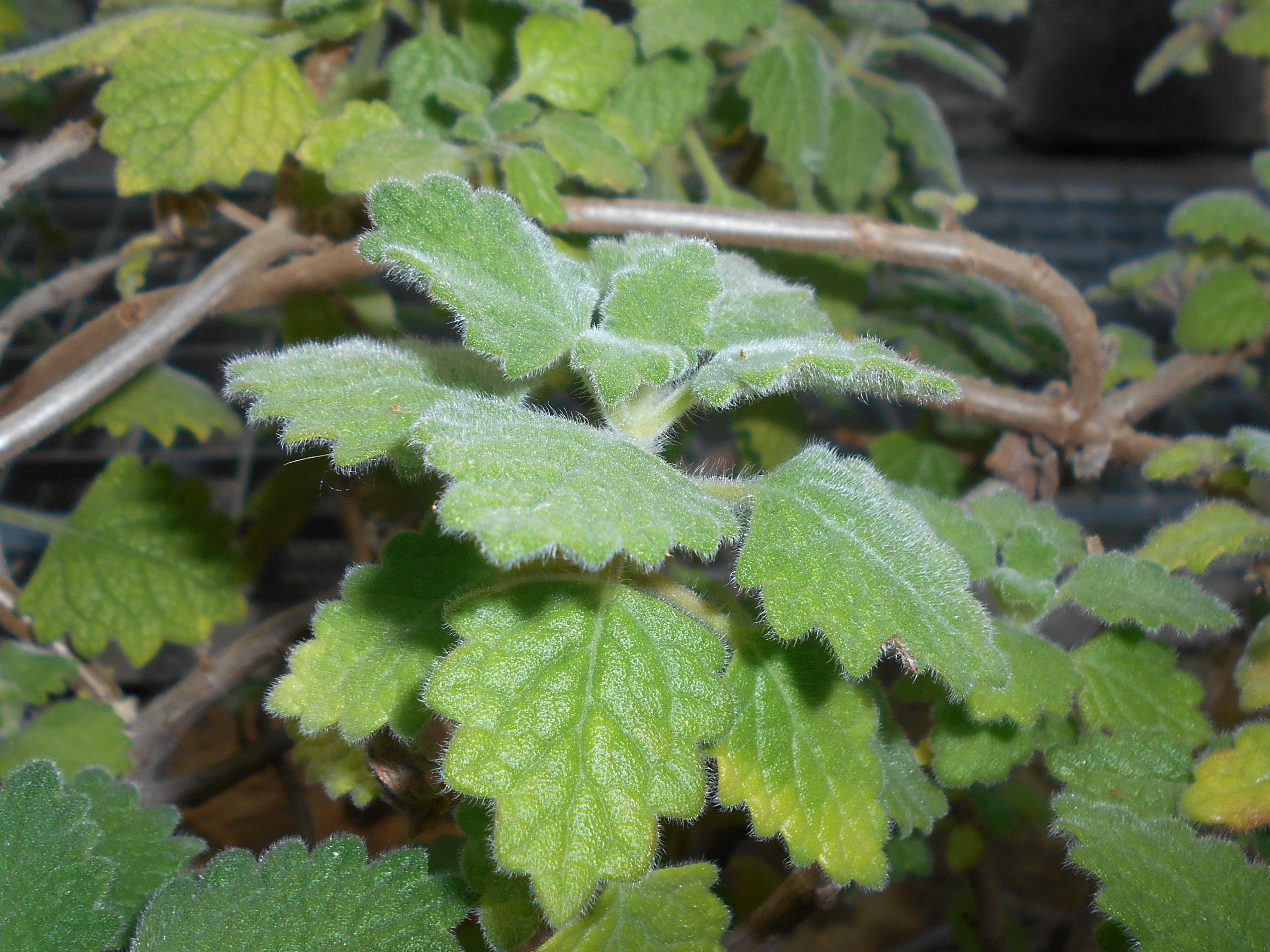 Plectranthus madagascariensis, Botanischer Garten Berlin.